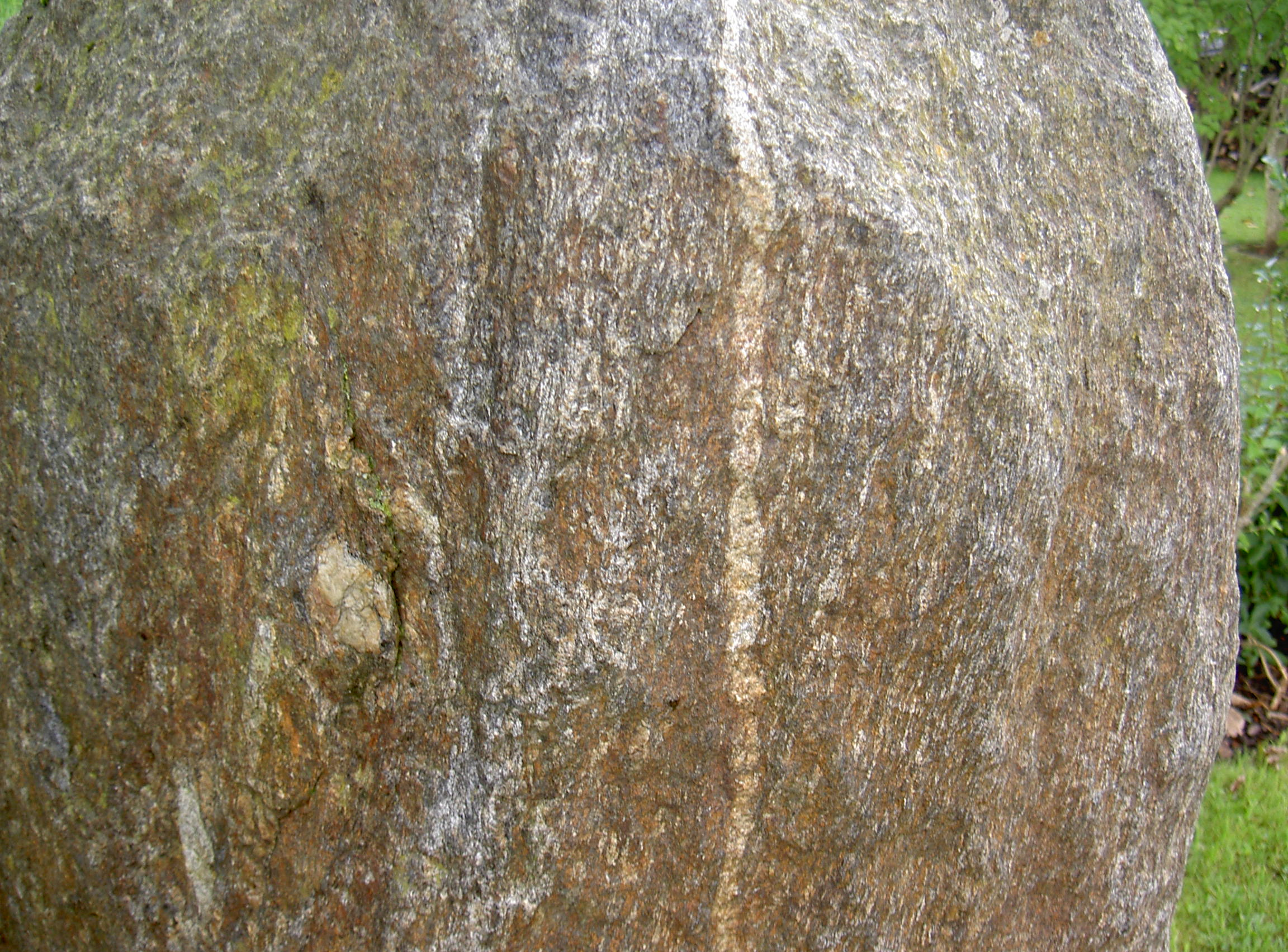 Treffelstein Drachenturmfelsen